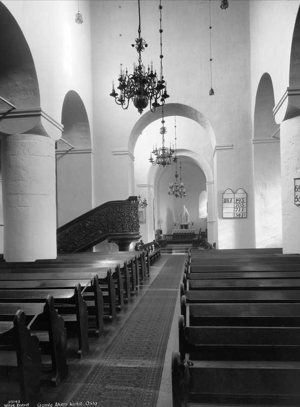 Gamle Aker kirke, interiør.